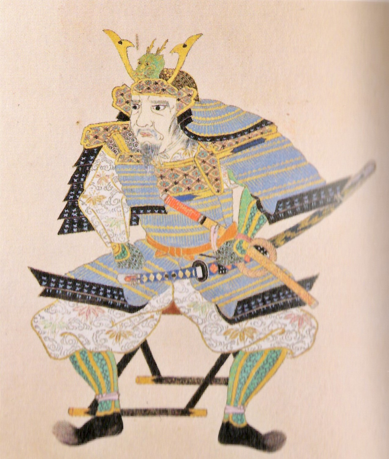 南部実光の肖像。